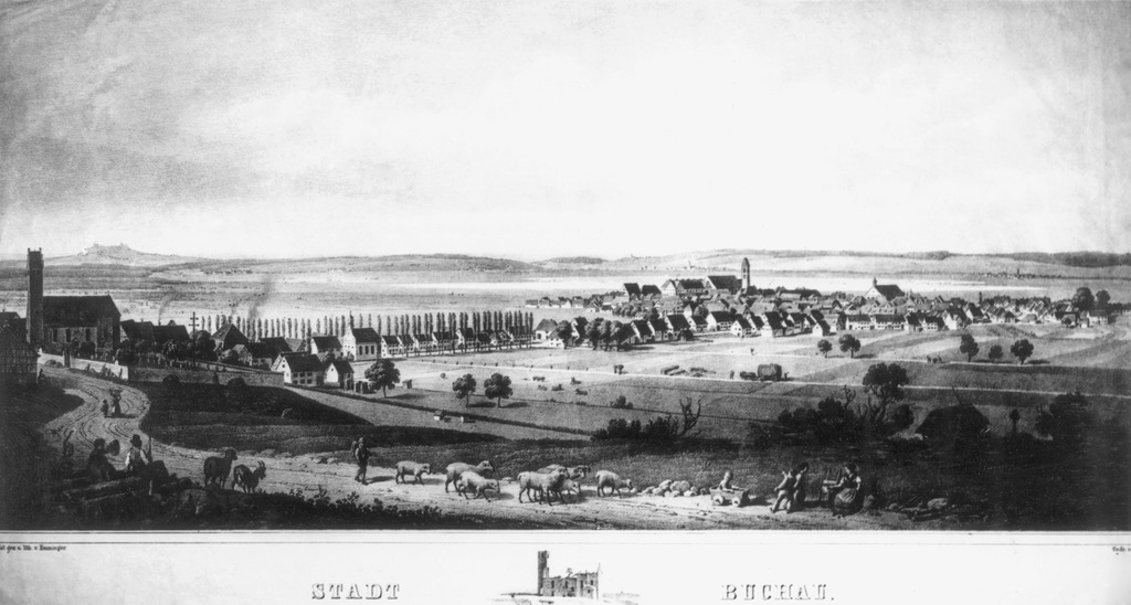 Buchau aus der Ferne,Lithographie um 1850, Bestand LMZ-BW, Urheber Bothner, Robert [Fotograf]